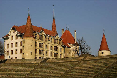 Avenches: Amphitheater / Schulhaus / Schloss